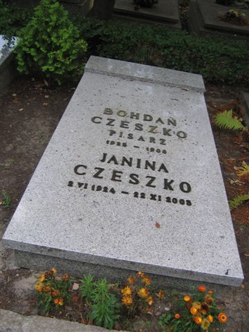 Bohdan Czeszko's monument (Powązki Cemetery; Cmentarz Komunalny, d. Wojskowy)